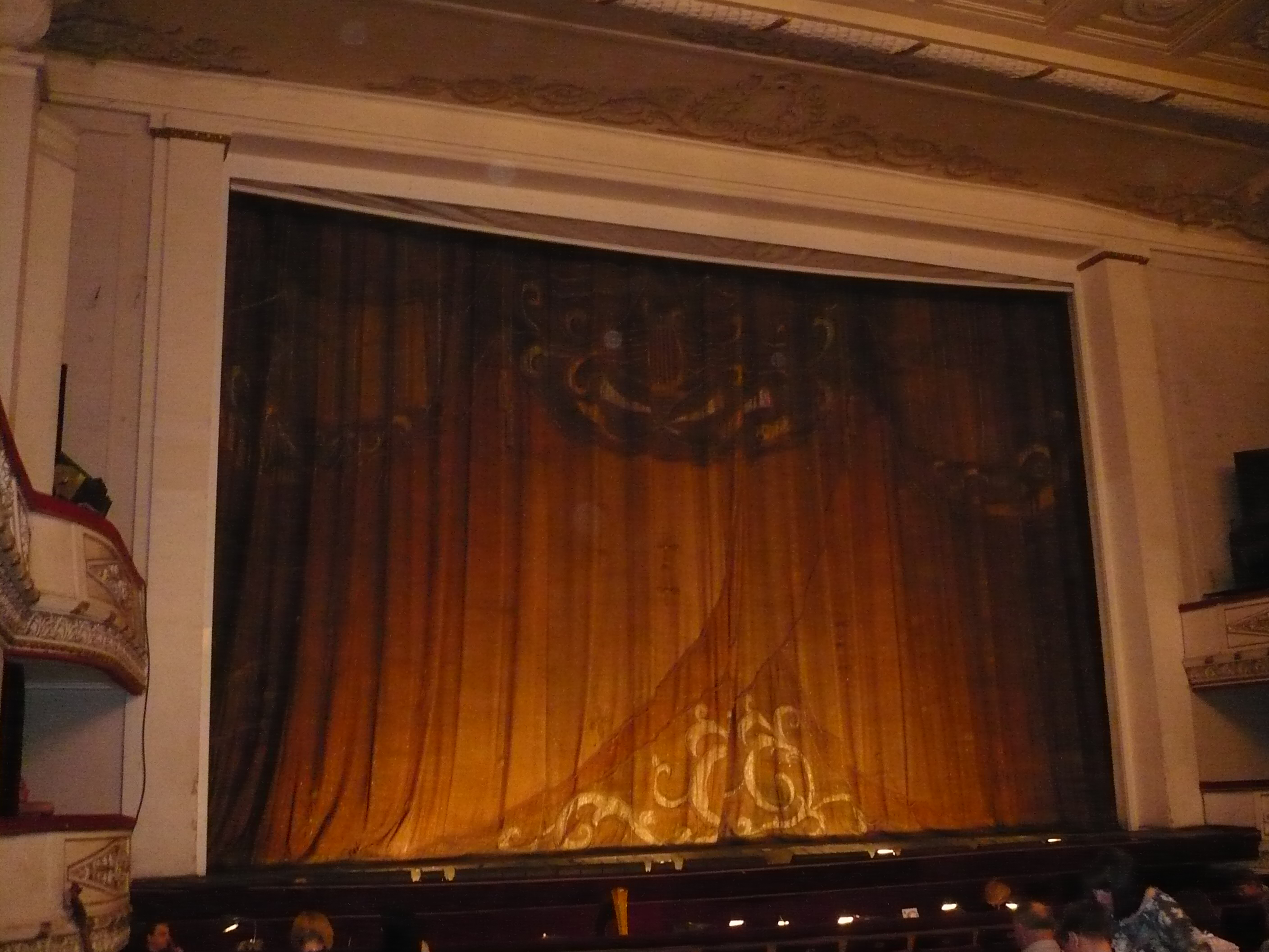 Кулисы